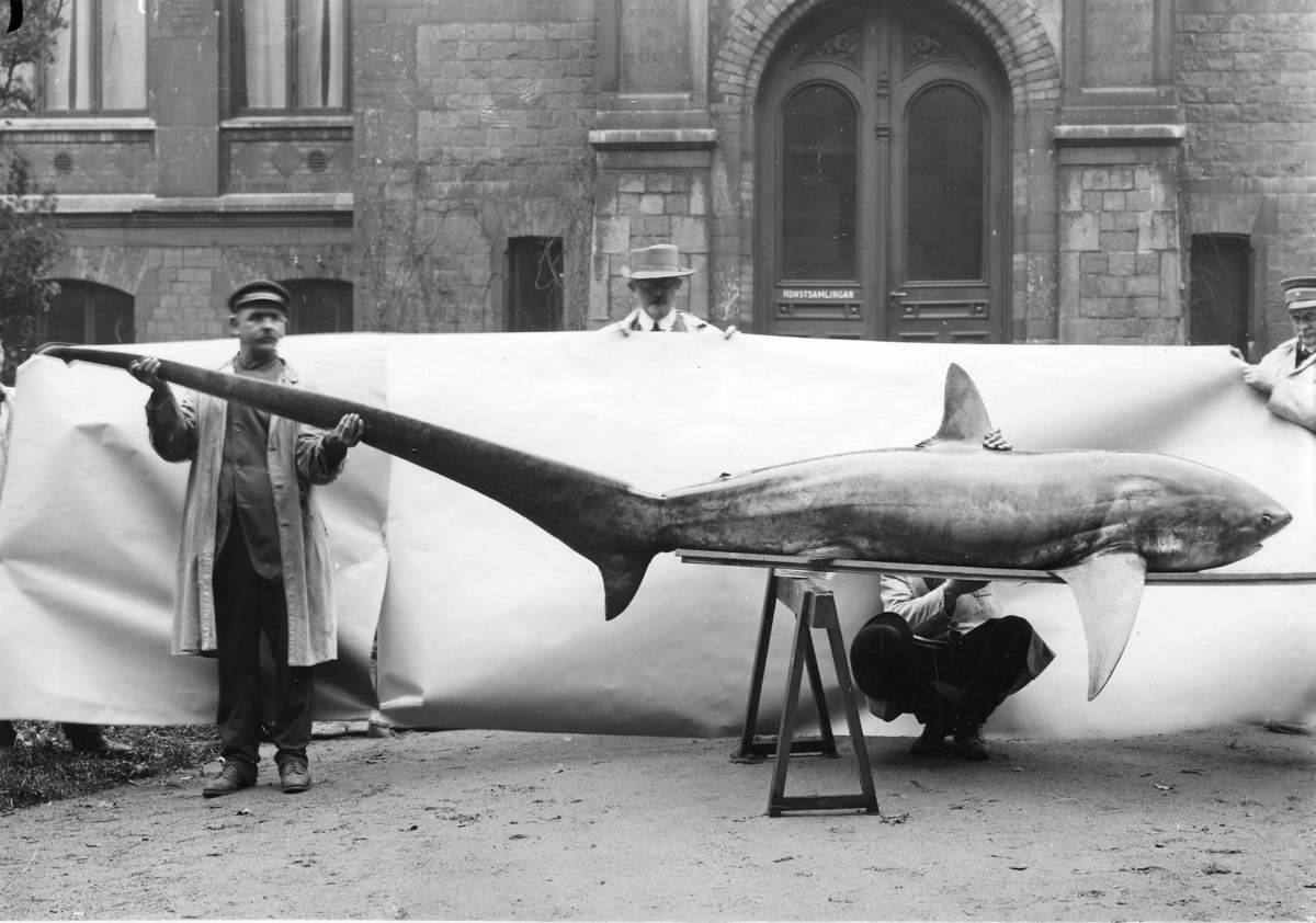 Rävhajhona, kroppslängd 4,47 m, därav 2,28 m på stjärten, sedd från sidan. Liggande på träbänk utanför Ostindiska huset. Fynddatum 1917-10-29. Exemplaret stoppad. :: Med på fotot 3 män med hatt och 1 man sittandes på huk bakom hajen. Samlingar av Naturhistoriska museet i Göteborg.